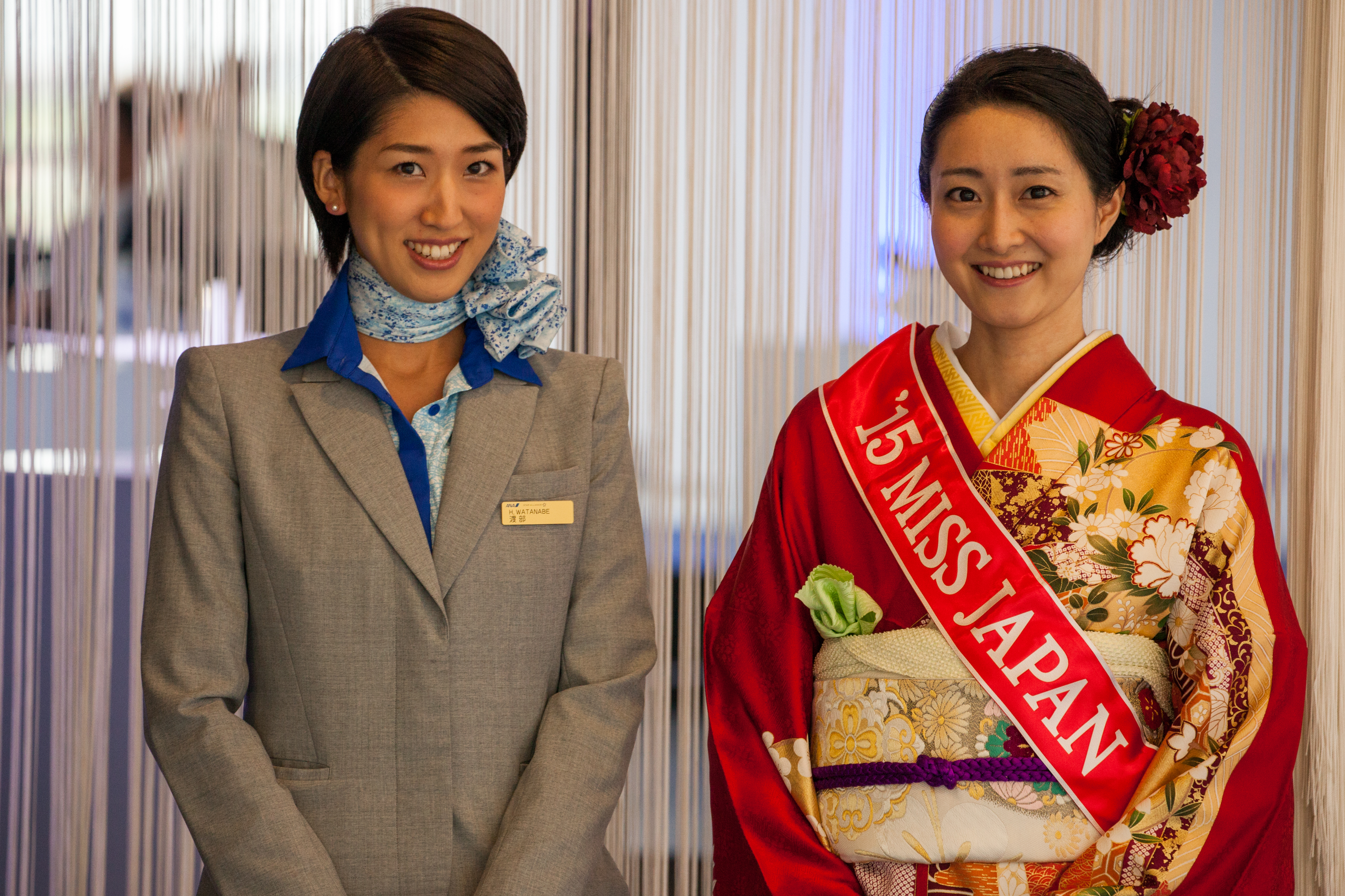 ANA (All Nippon Airways) inaugural flight to Brussels meets Chisato Haga(2015 Miss Japan Grand Prix Artistic Swimmer)右の人物（振袖にたすきをかけている人物）はアーティスティックスイミング元日本代表でANA関連会社勤務（当時）、2015年度ミス日本コンテストグランプリを受賞した芳賀千里さん